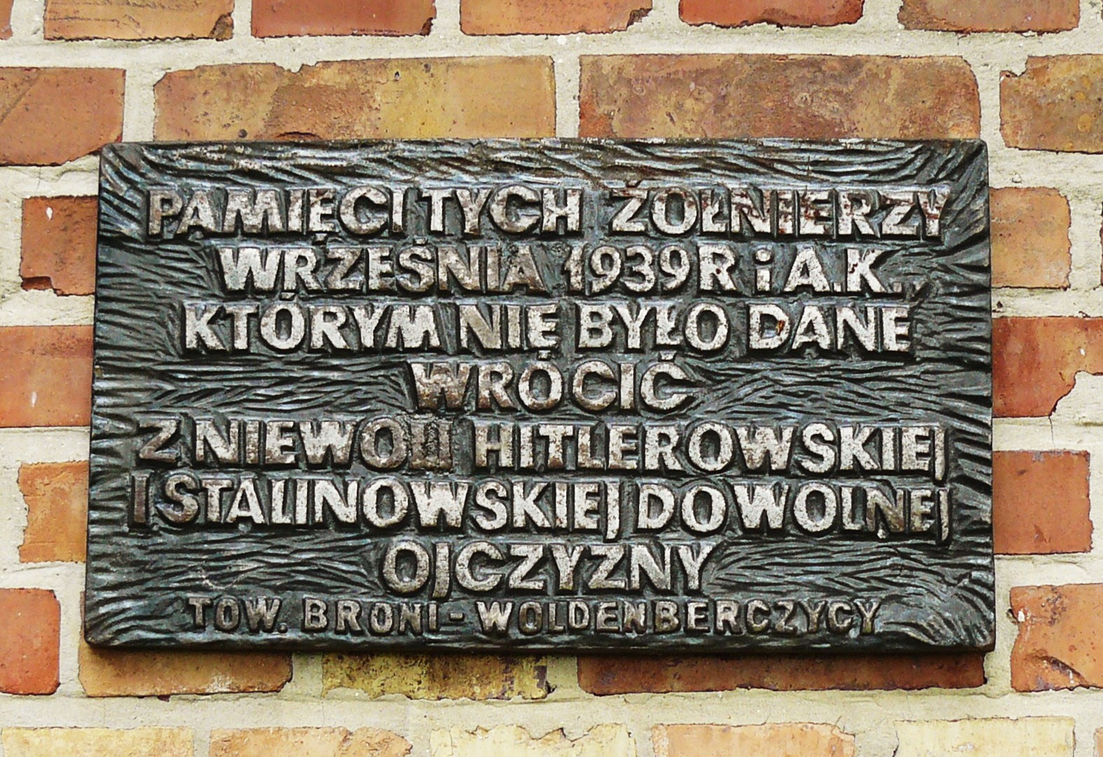 Muzeum Oflagu II C Woldenberg w Dobiegniewie.